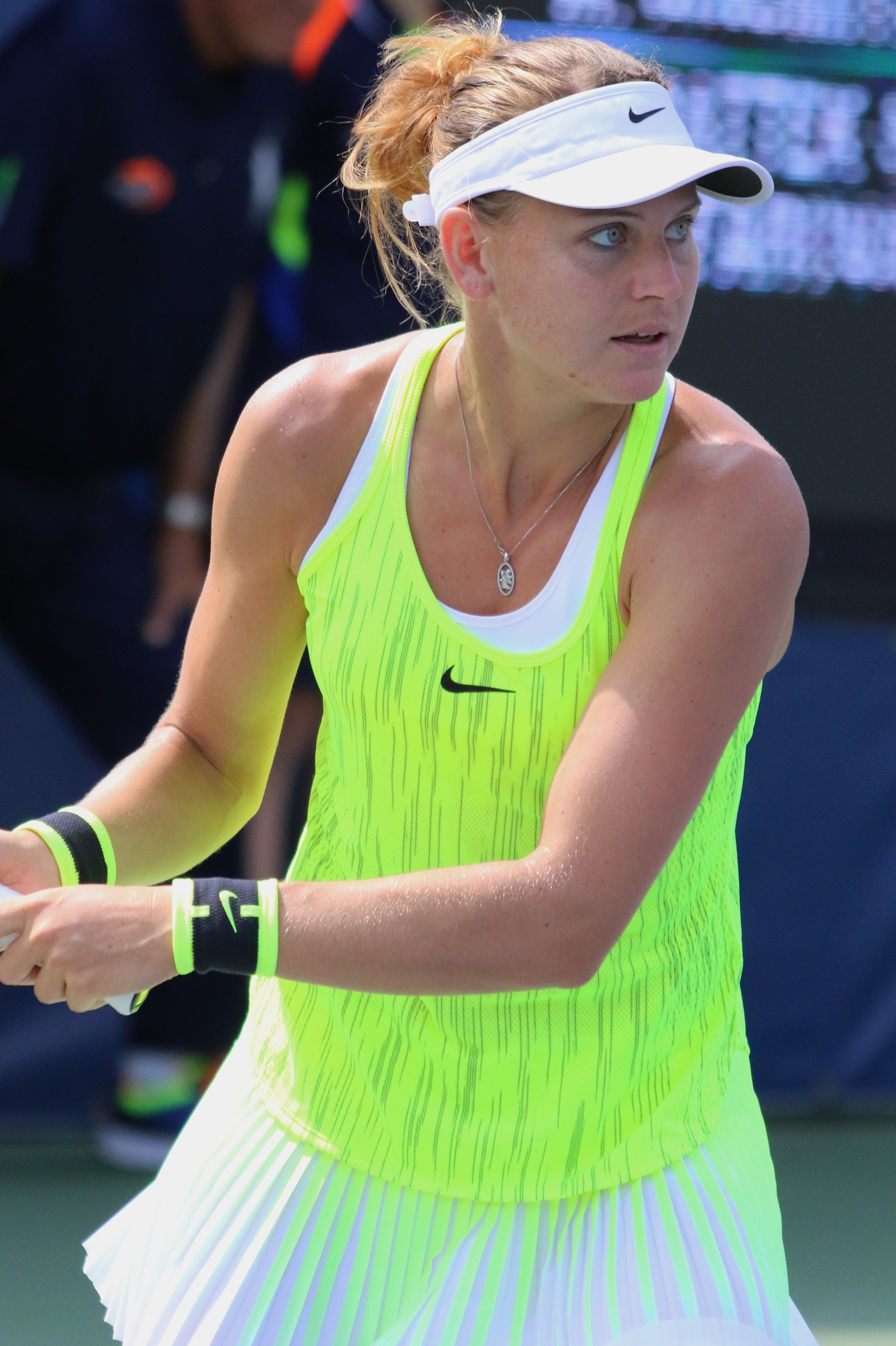 Safarova US16 (10)